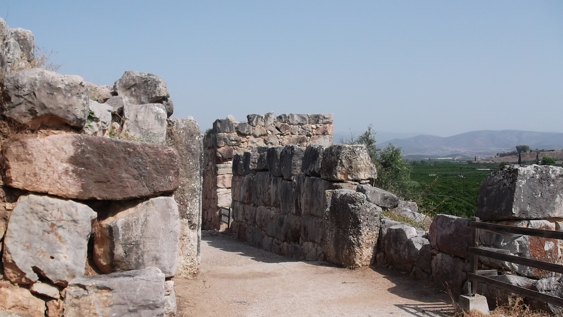 Τίρυνθα«Τίρυνθα»